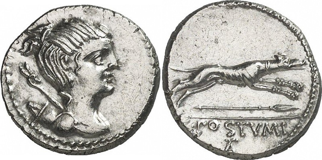 Denario de la Gens Postumia (74-73 a.C.) en el que aparece representado un perro tipo galgo.